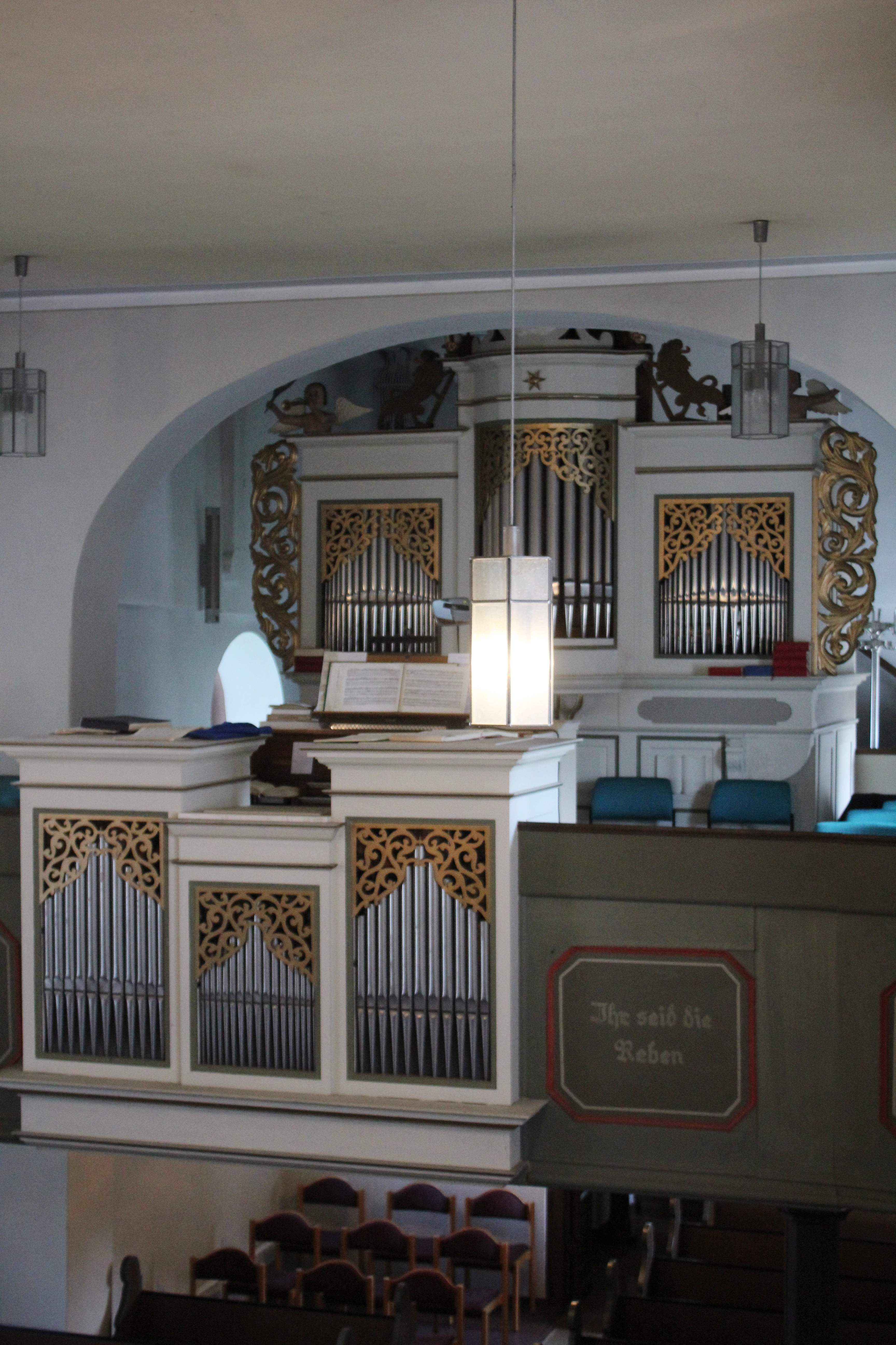 Evangelische Kirche Wetzlar-Dutenhofen, Lahn-Dill-Kreis, Hessen, Deutschland